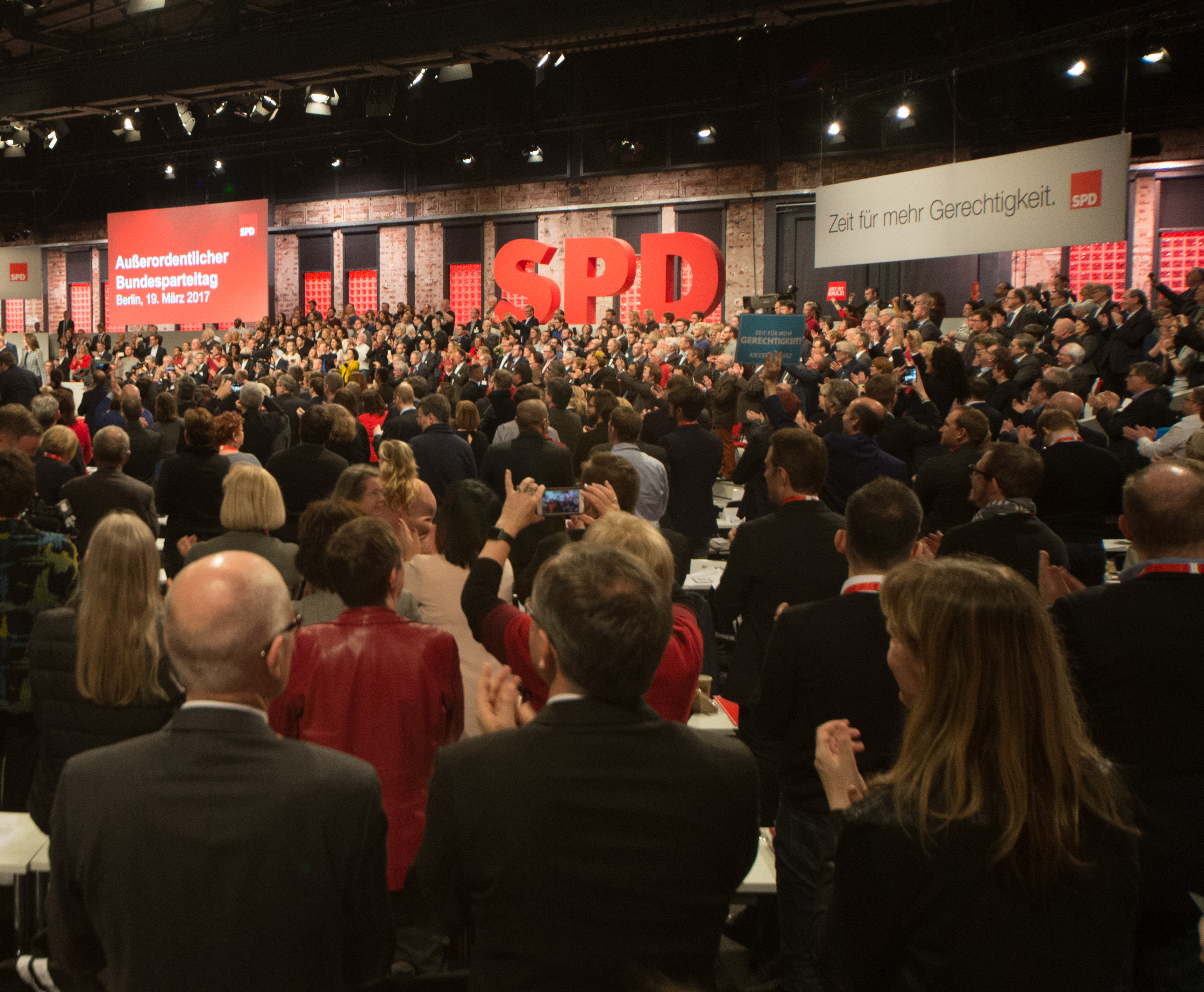 SPD Bundesparteitag am 19. März 2017 in Berlin